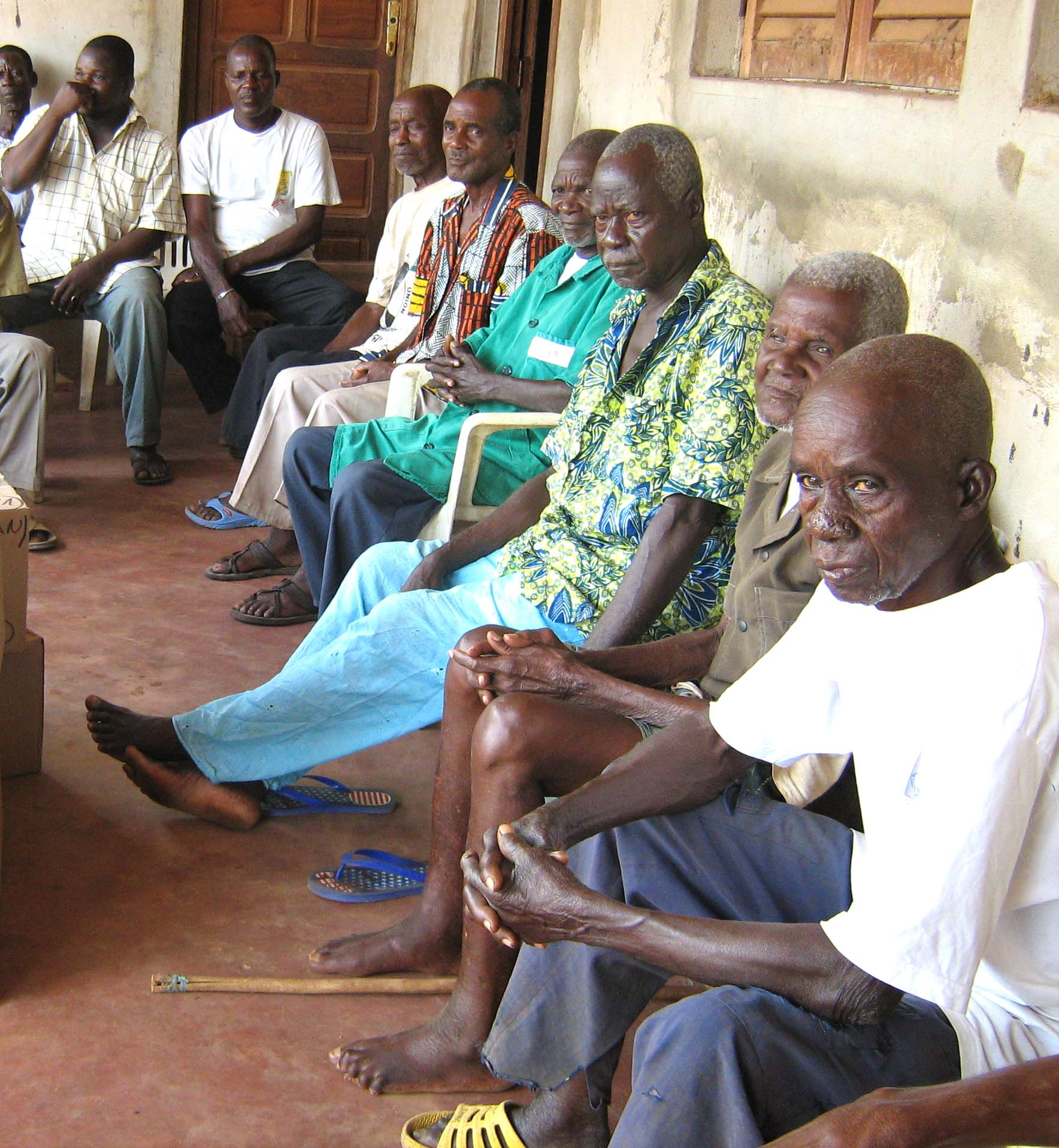 Image en format jpeg